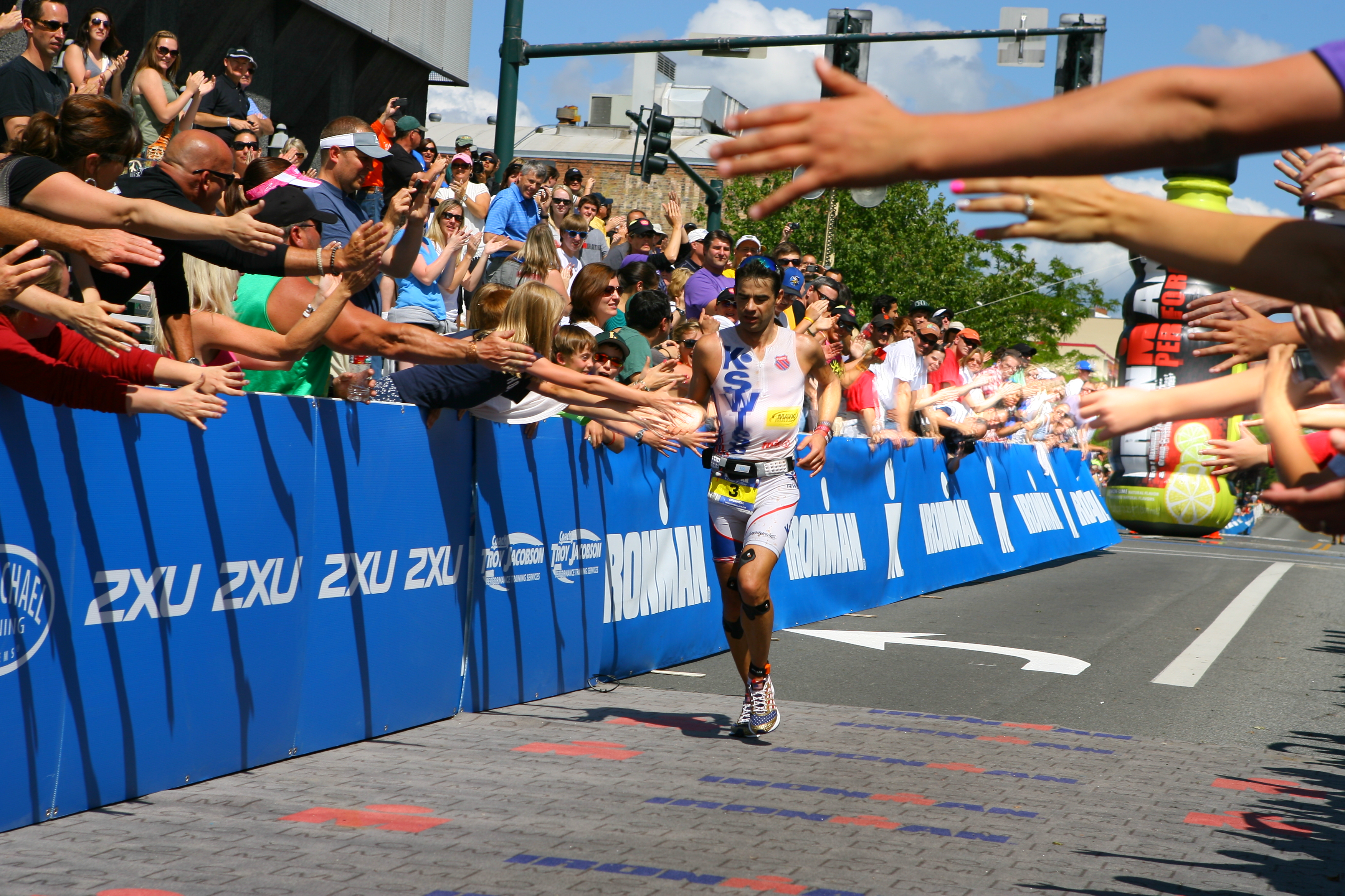 Tim O'Donnell